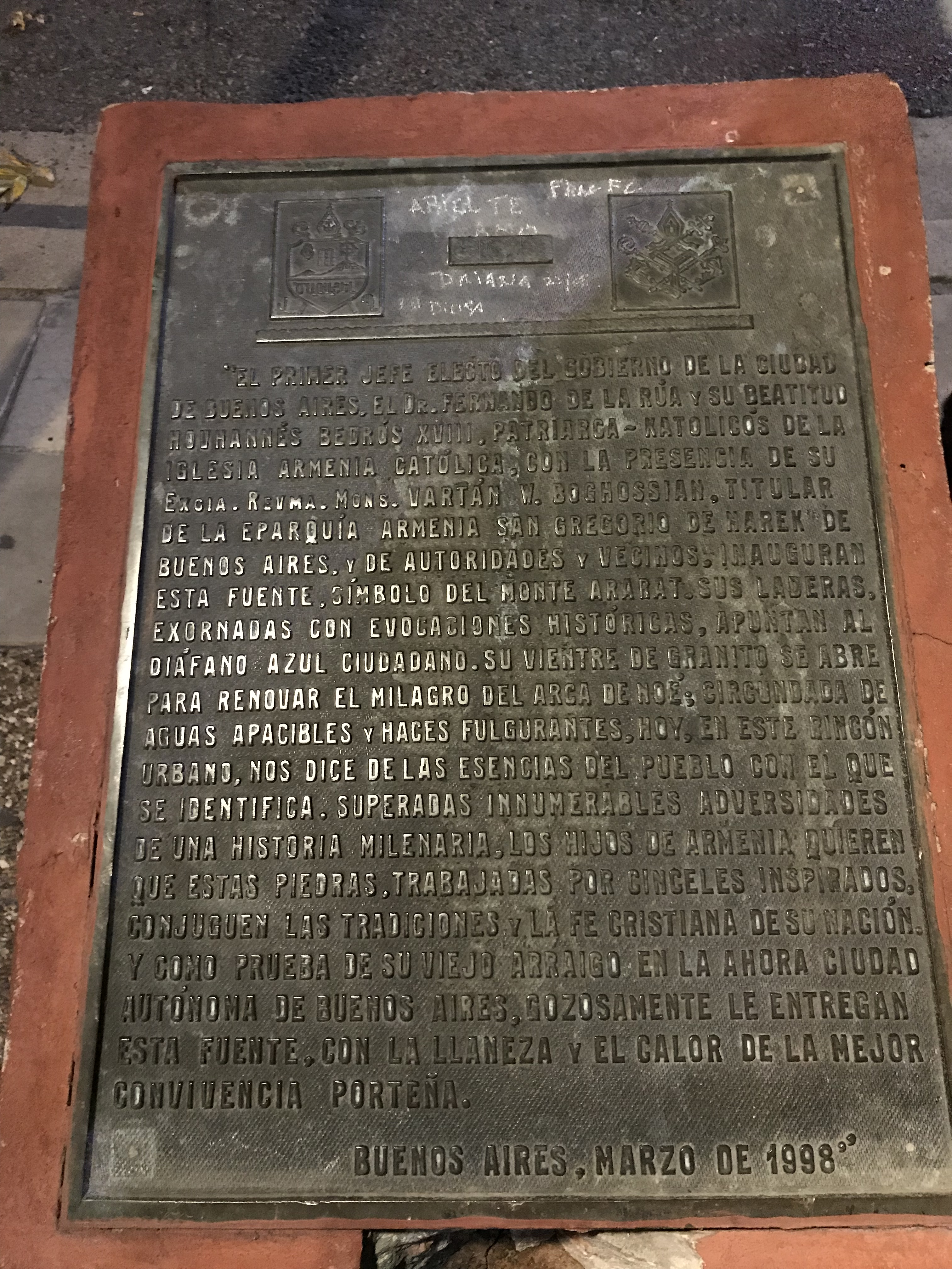 Esta placa, datada de marzo de 1998 deja constancia de la inauguración de la Fuente en la Plazoleta Ararat. Simboliza la magnificencia del Monte Ararat y su magnífica naturaleza.